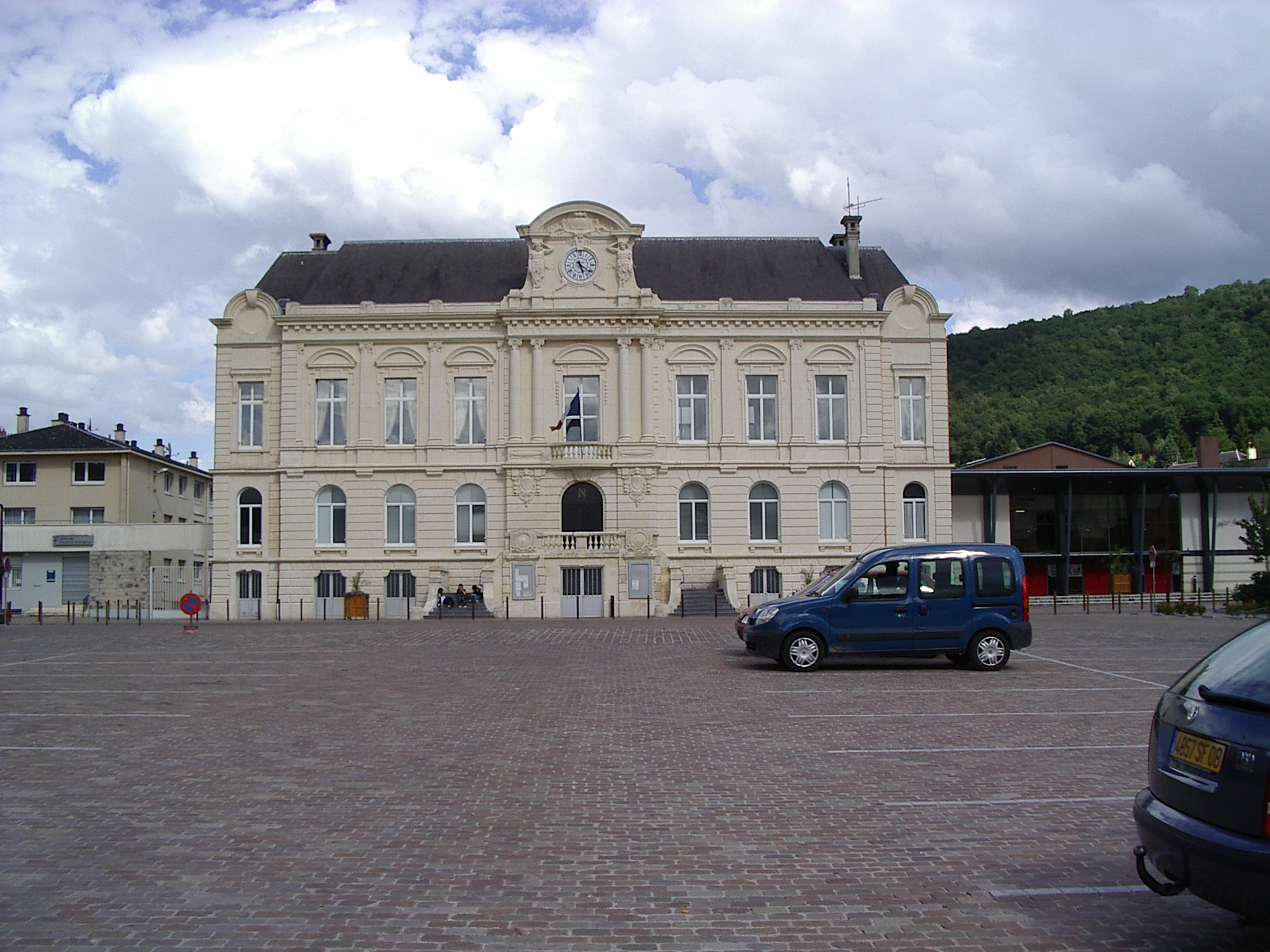 Mairie de Nouzonville,Ardennes,France.